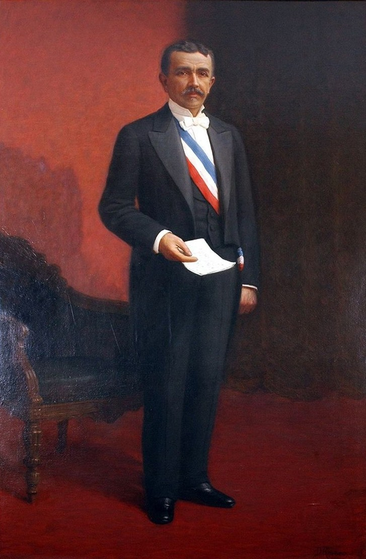 Federico Errázuriz Echaurren. Periodo: 18 de septiembre de 1896 - † 12 de julio de 1901. Autor: Demetrio Reveco. Propiedad: Museo Histórico Nacional